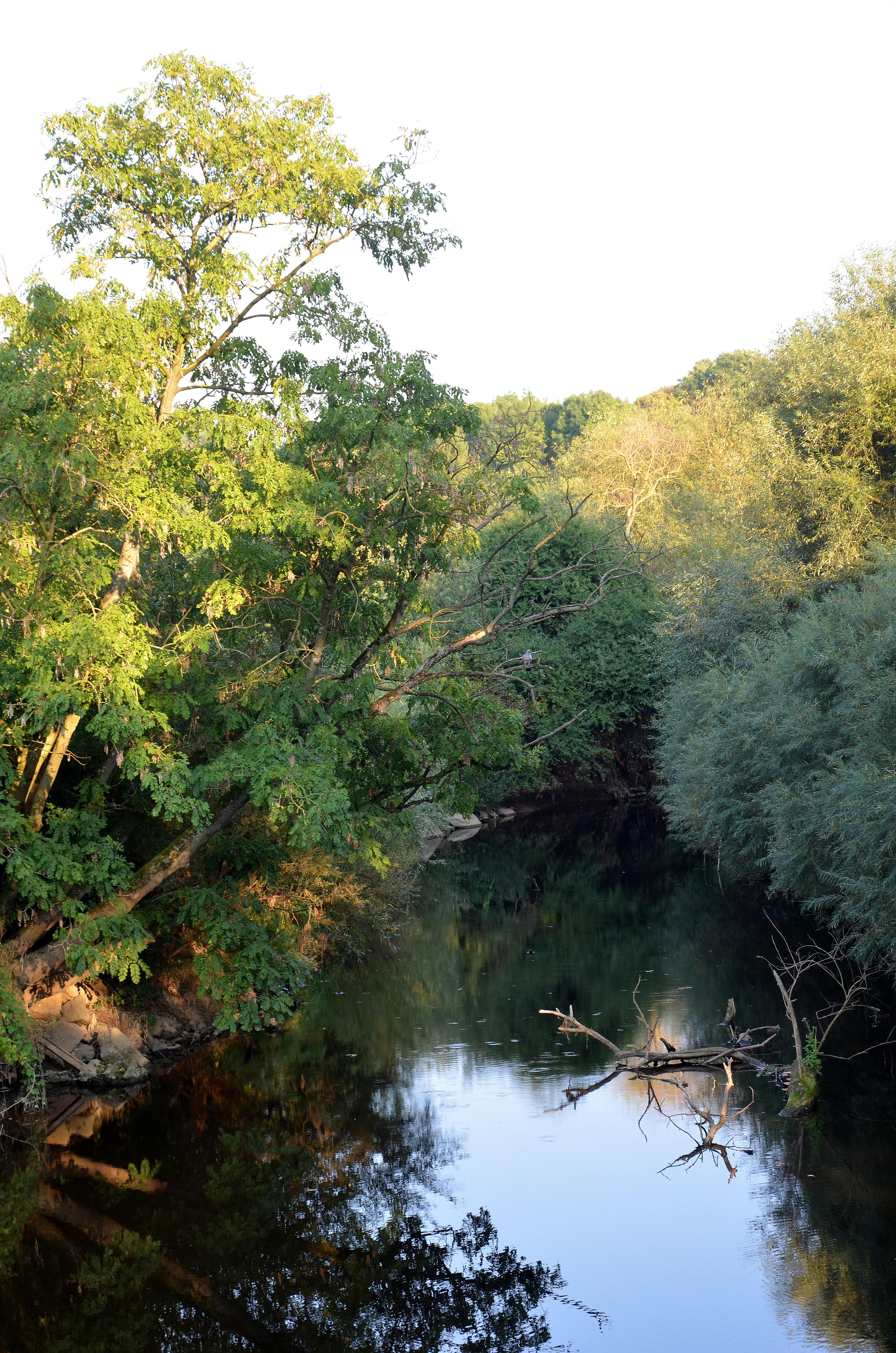 Blick von der Calenberger Brücke bei Schulenburg in der Region Hannover auf die Leine flussabwärts ...